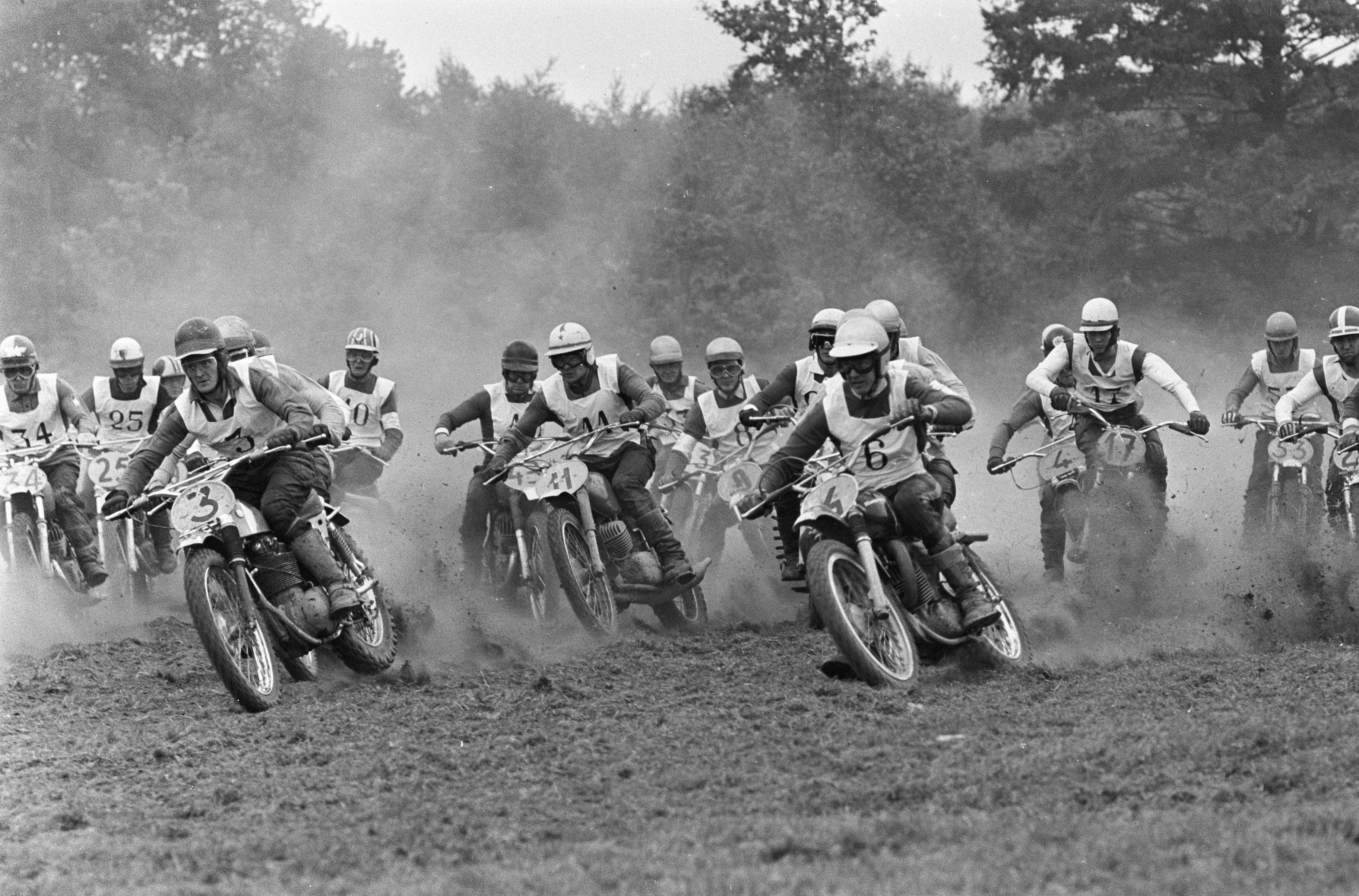 Collectie / Archief : Fotocollectie Anefo Reportage / Serie : [ onbekend ] Beschrijving : Motorcross Des Nations 1967 te Markelo. Start eerste manche Datum : 3 september 1967 Locatie : Markelo Persoonsnaam : Gunars Draugs (CZ, 11), Vic Eastwood (BSA, 3), Arthur Lampkin (BSA, 4), Åke Jonsson (Husqvarna, 8), Torsten Hallman (Husqvarna, 6), Jan Johansson (Lindström, 10) Trefwoorden : Motorcross Fotograaf : Koch, Eric / Anefo Auteursrechthebbende : Nationaal Archief Materiaalsoort : Negatief (zwart/wit) Nummer archiefinventaris : bekijk toegang 2.24.01.05 Bestanddeelnummer : 920-6728